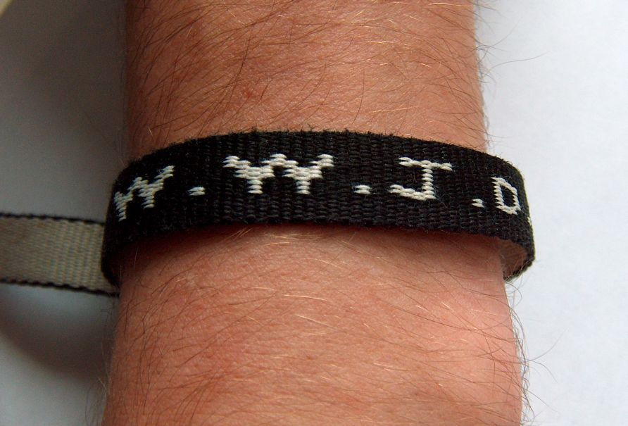 WWJD-Armband